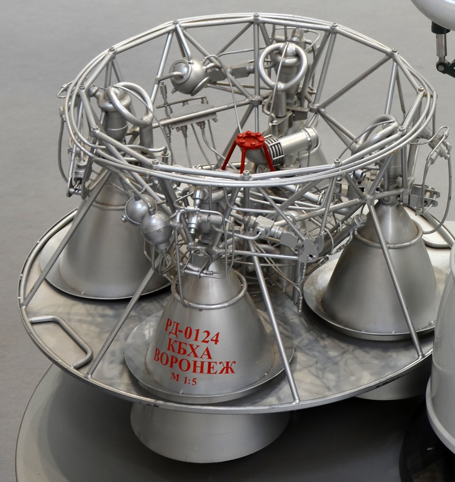 Maquette du moteur-fusée russe RD-0124 exposée au salon du Bourget 2013.